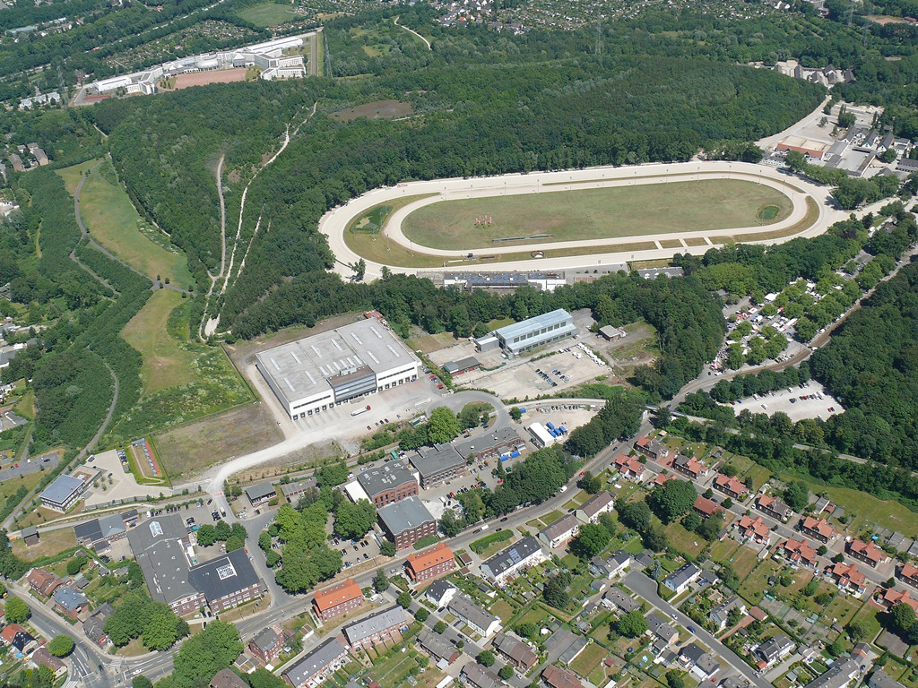 Luftbild der Triple Z AG mit Blick auf die Gelsenkirchener Trabrennbahn (2011)